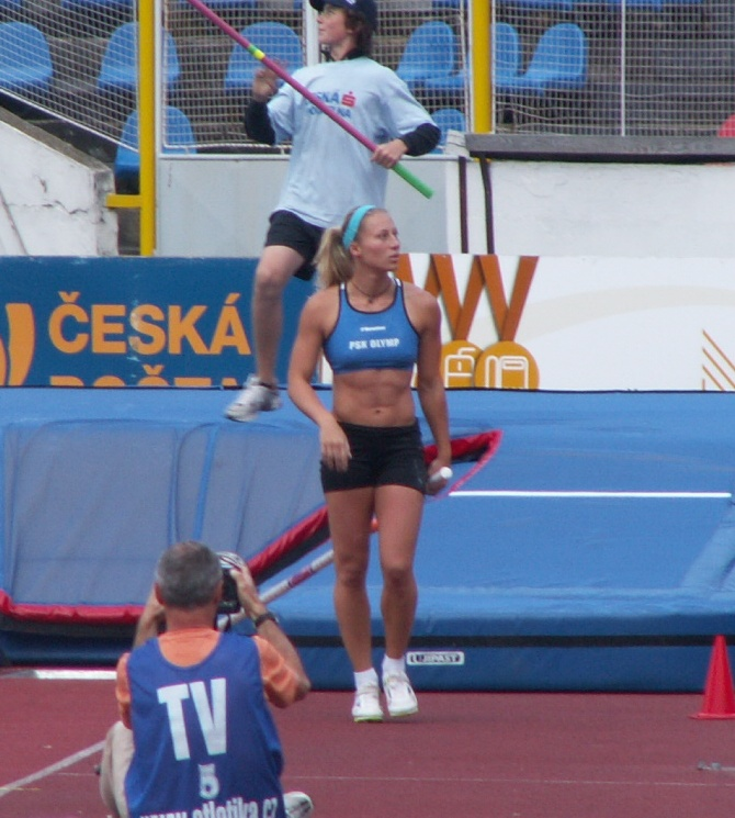 Jiřina Ptáčníková na mistrovství ČR na dráze 2009